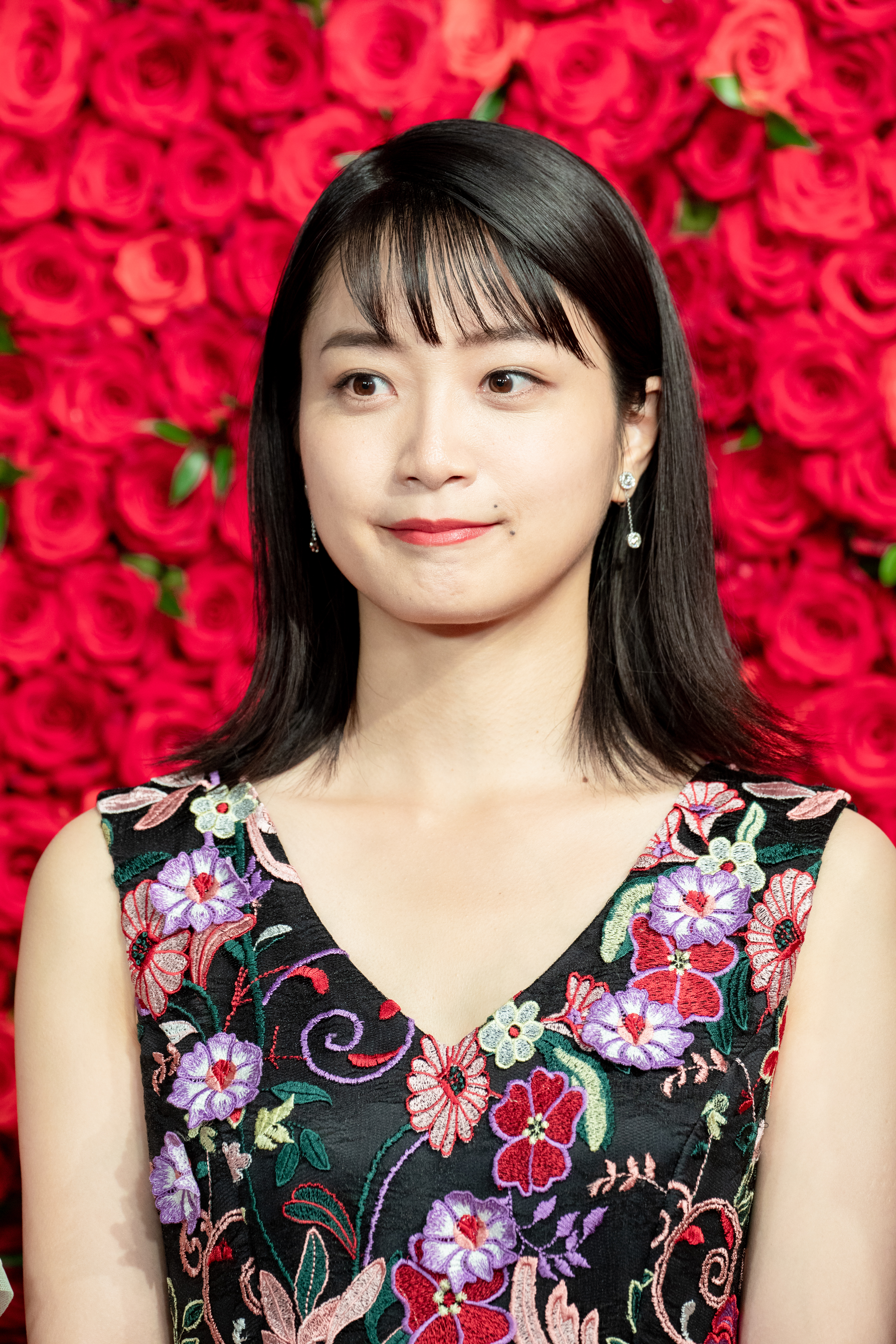 第30回 東京国際映画祭 オープニングセレモニー 深川麻衣 (愛がなんだ)